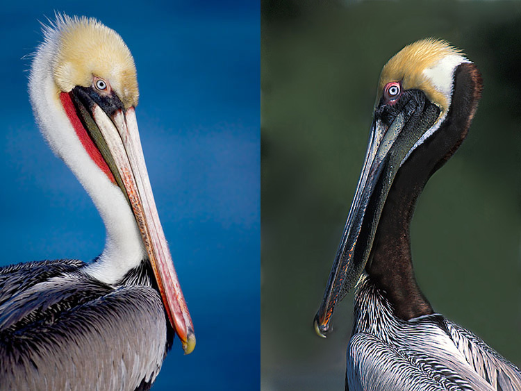 Brownpelican-normal 2 plumages.jpg: Варіанти забарвлення бурого пелікана (pelecanus occidentalis)